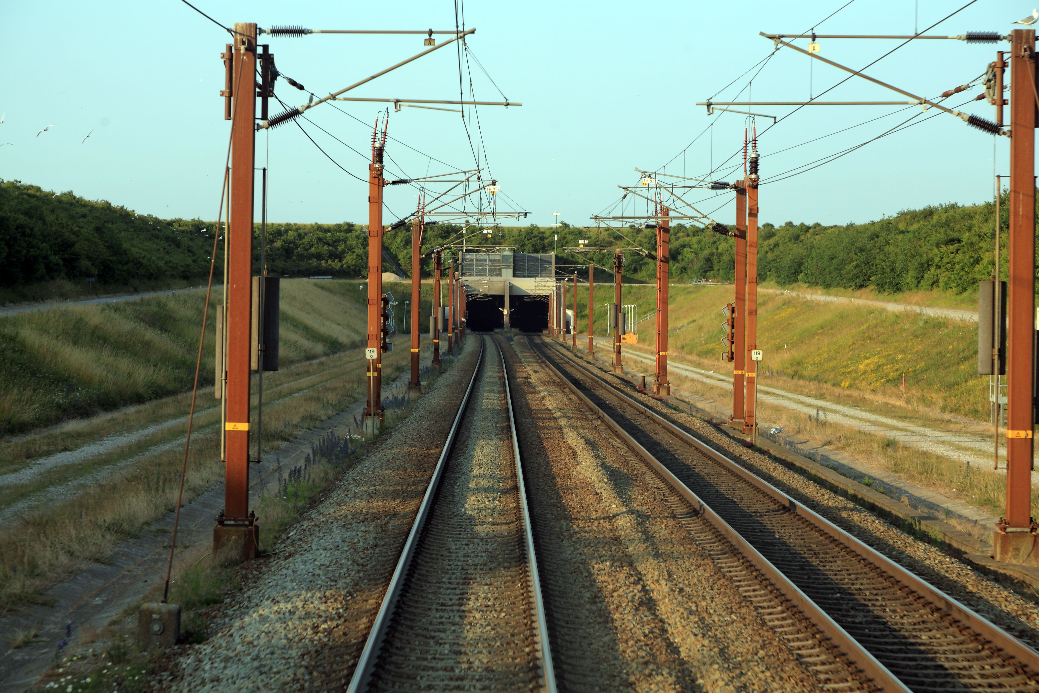 auf der künstlich vergrößerten Insel Sprogø, vor dem Tunnel sind beide Gleise für das Einsetzen von Zweiwegefahrzeugen eingedeckt. Auf beiden Seiten liegen die Straßenzufahrten für die Tunnelrettung.